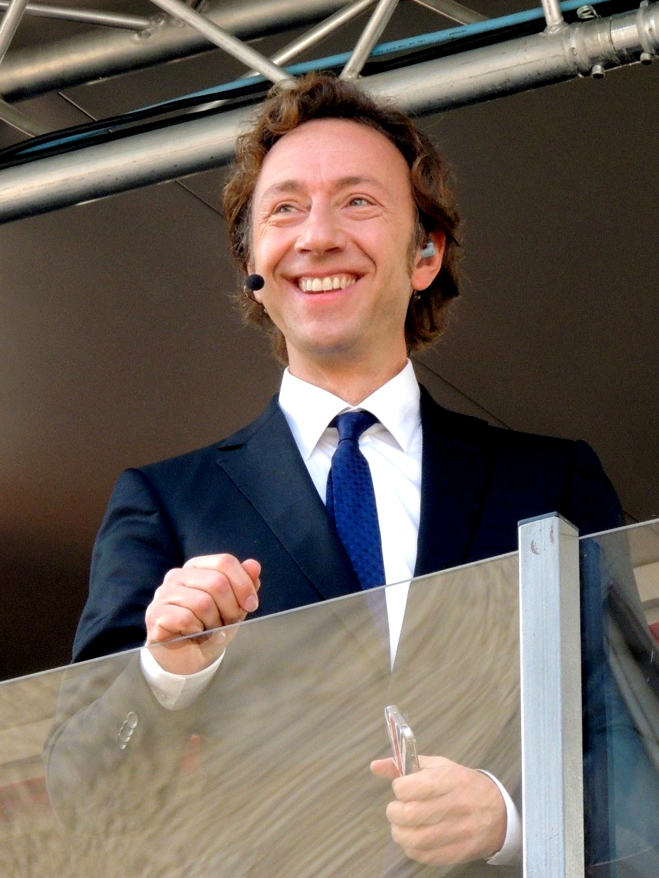 De Stéphane Bern den Dag vum Bestietnes vum Ierfgroussherzog Guillaume.